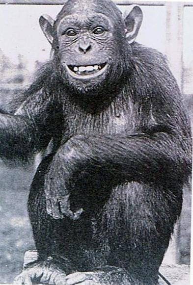 "Rana". Estación de Antropoides de Tenerife.